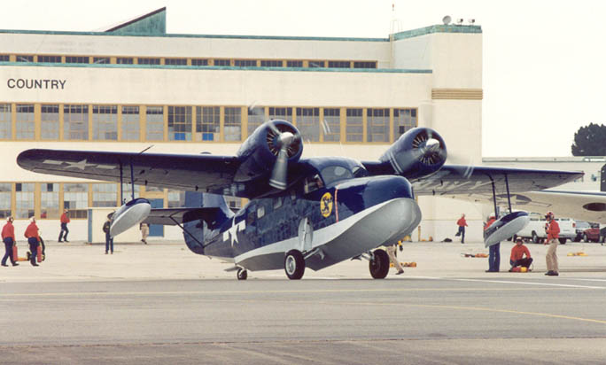 Grumman G-21A as JRF-5 at NAS Alameda.